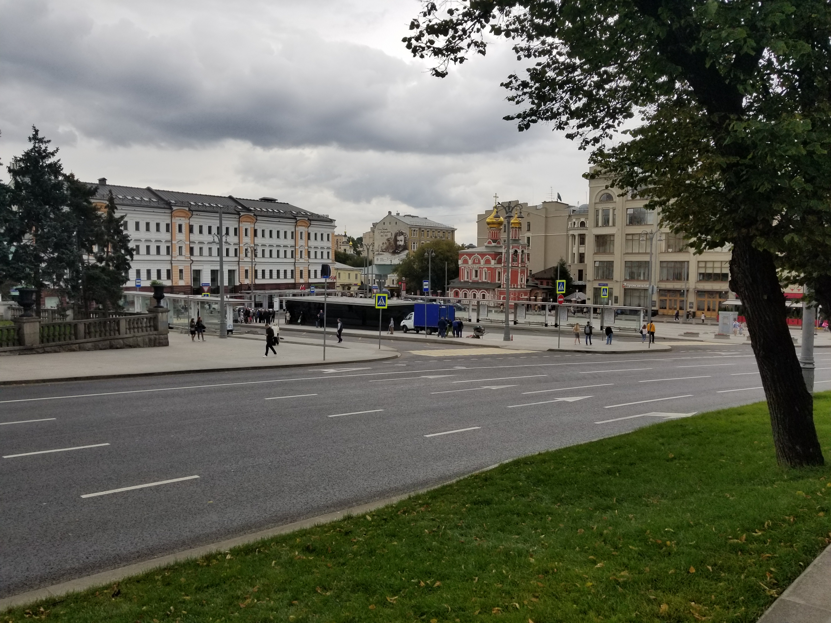 Славянская площадь после реконструкции (сентябрь 2017)